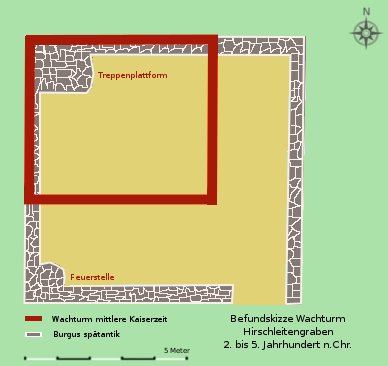 Befundskizze Wachturm und Burgus Hirschleitengraben bei Linz/OÖ.